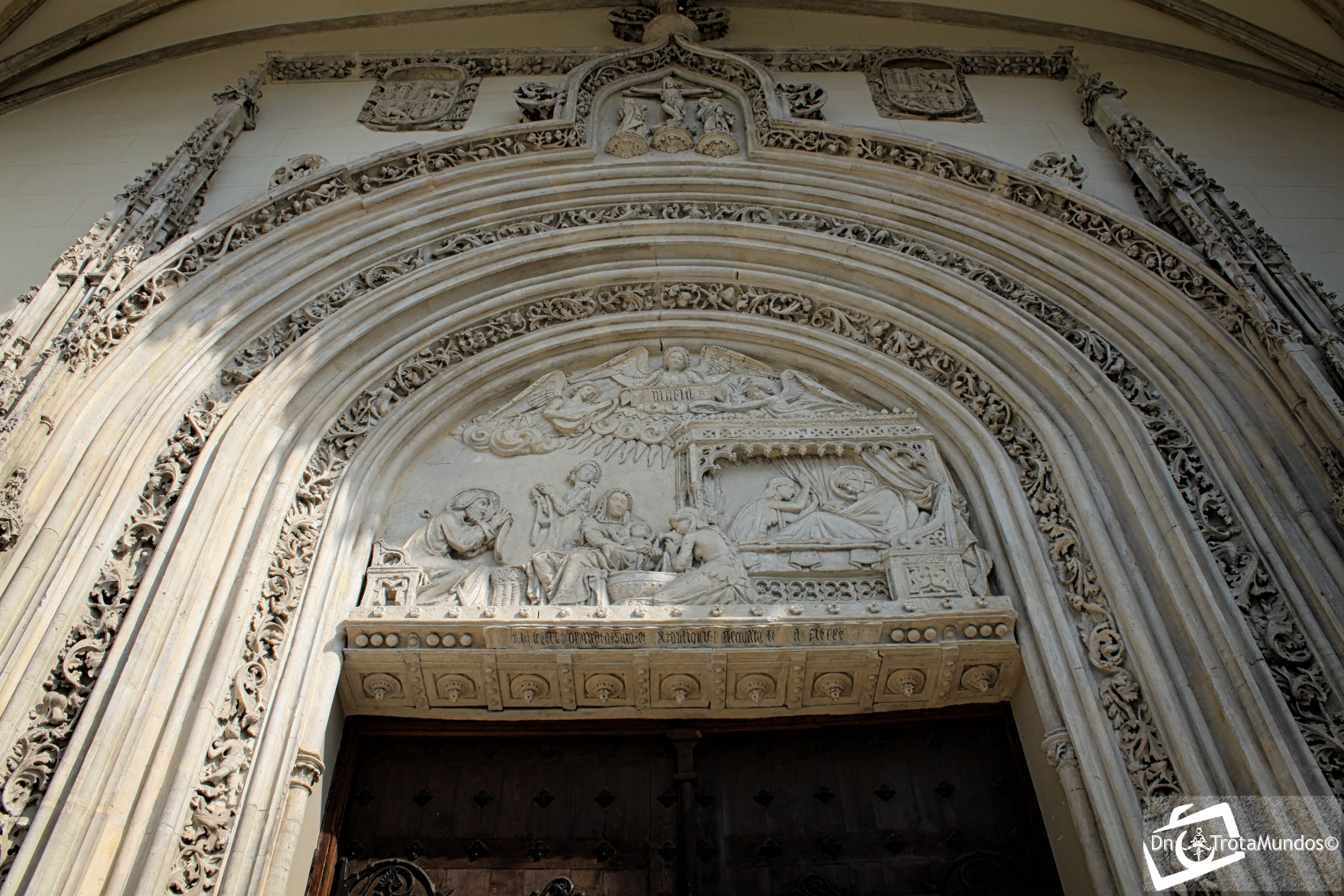 Frontón con angelicos' y arquivoltas de ataurique